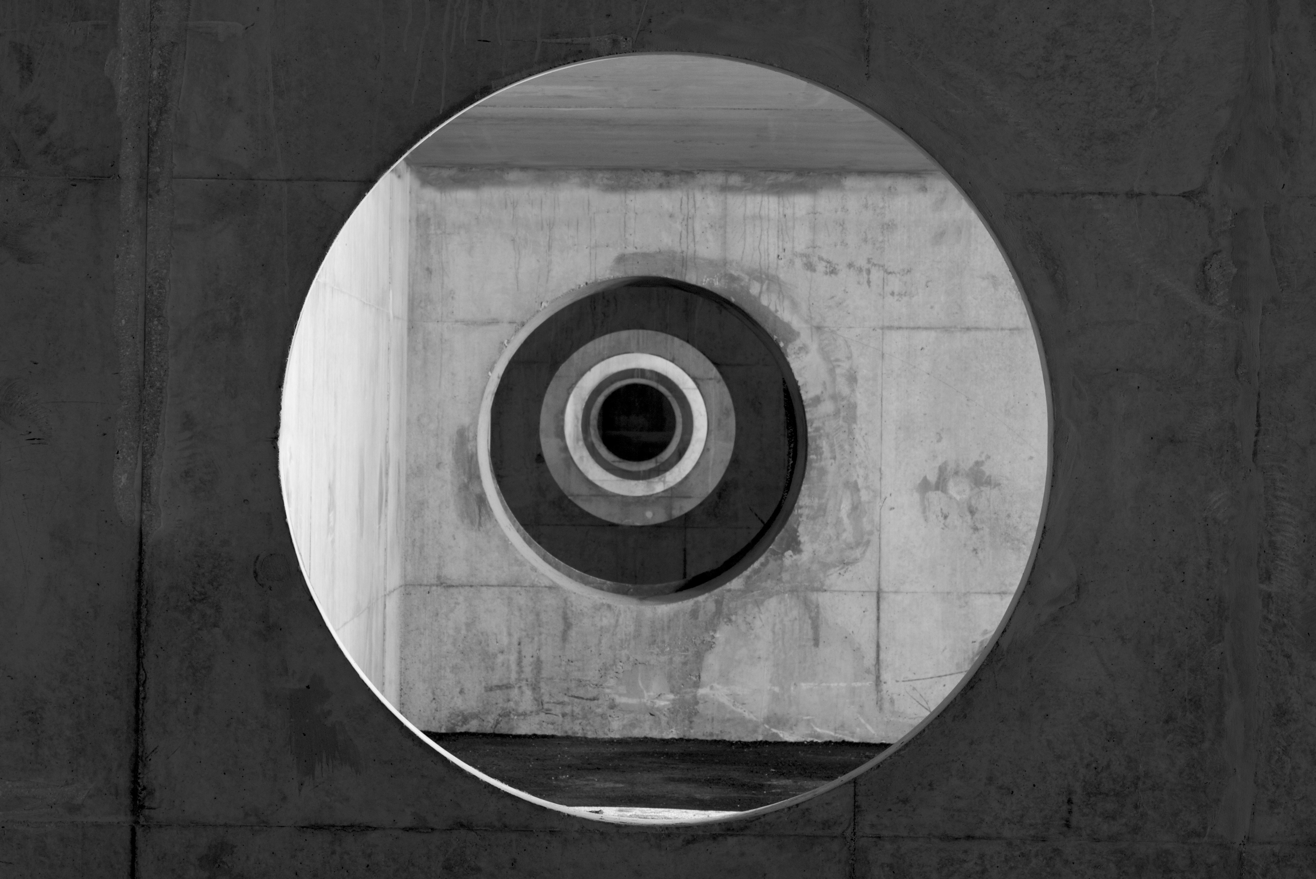 Parking sous le Stade des Alpes de Grenoble. Avec des trous dans les murs, pleins de trous !